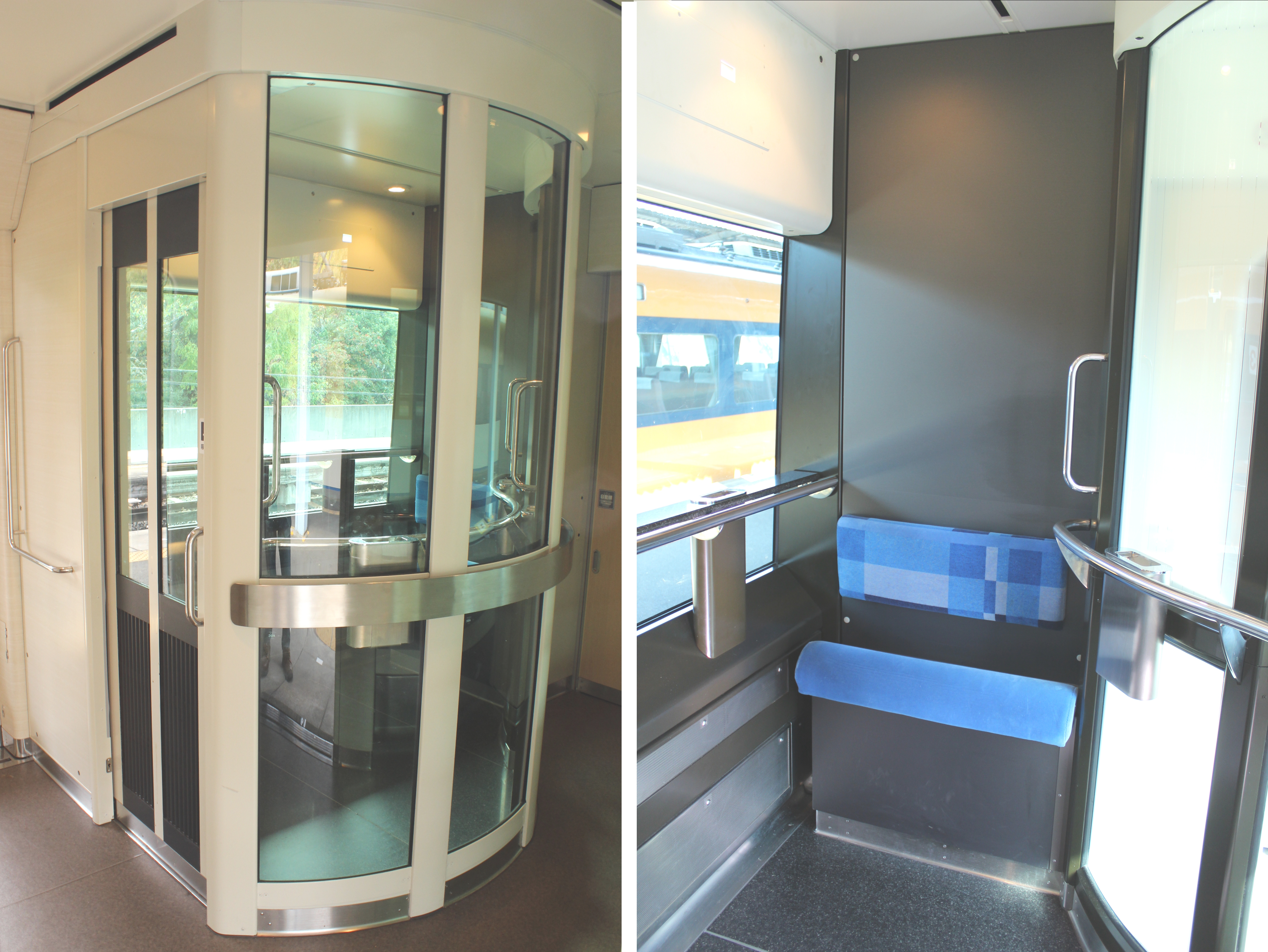 23000系リニューアル車の喫煙室